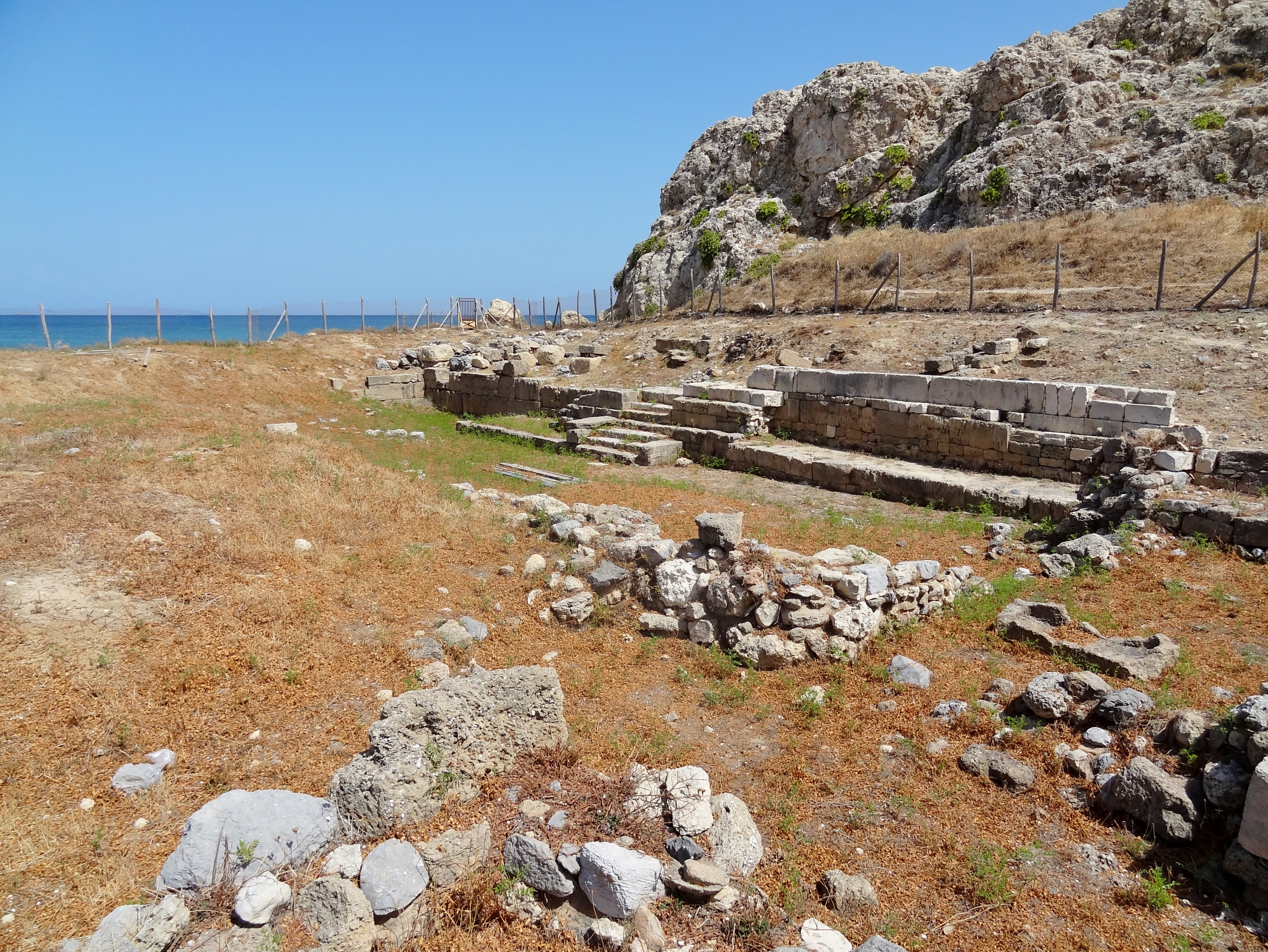 Heiligtum des Zeus Thenatas von Amnissos bei Iraklio, Kreta, Griechenland